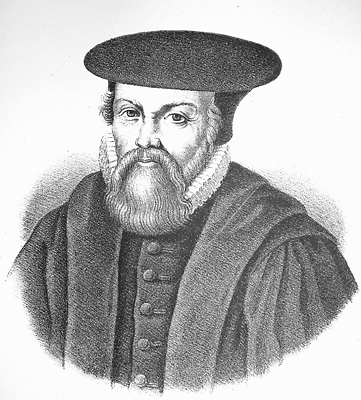 Peder Palladius, 1503 - 3. januar 1560, luthersk biskop over Sjællands Stift (Denmark) i tiden umiddelbart efter reformationen.